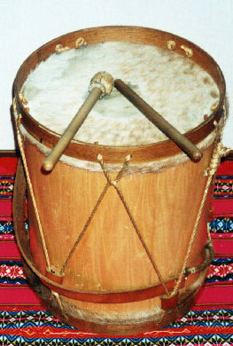 Tambor para musica argentina y musica andina.